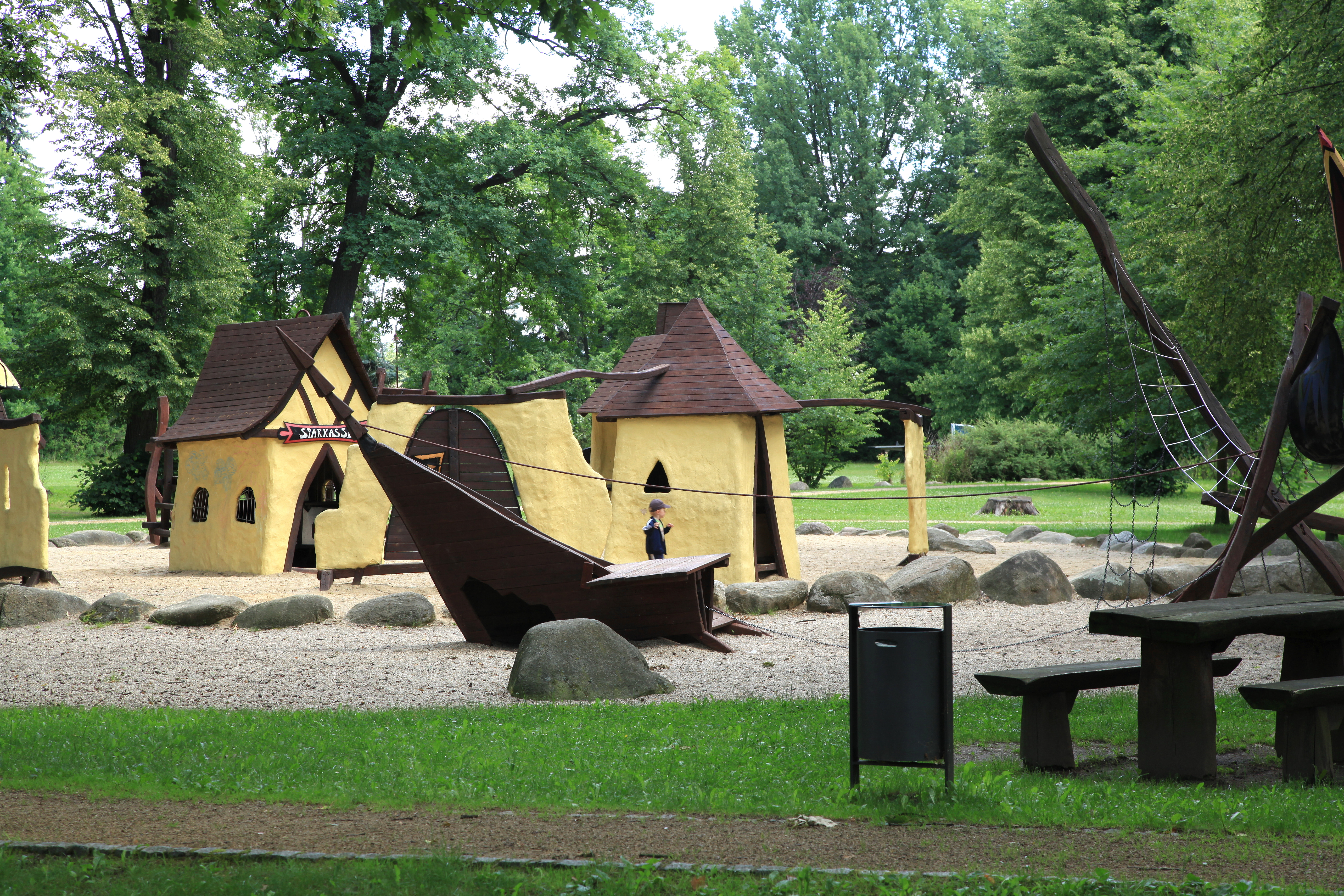 Knax-Spielplatz an der Jäcklein-Rohrbach-Straße in Sproitz, Quitzdorf am See